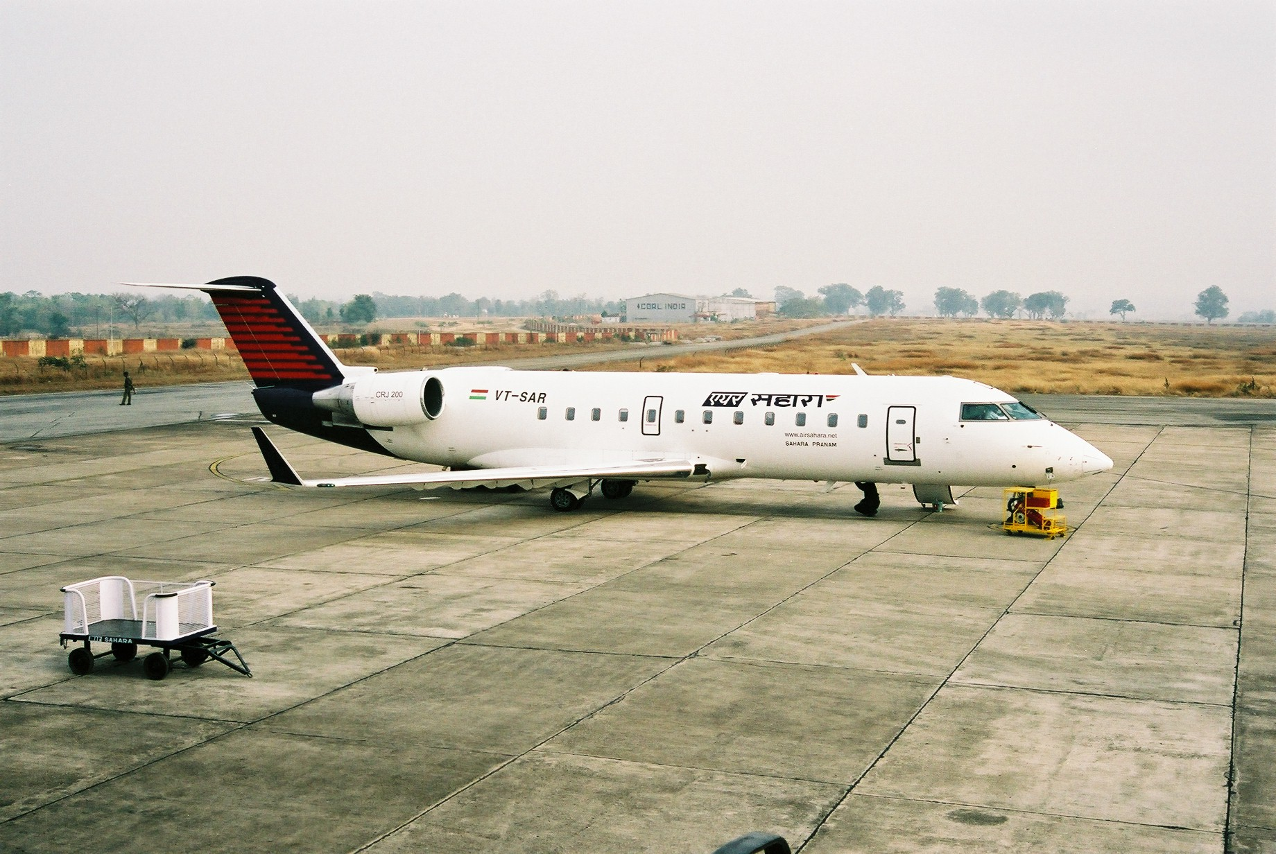 Air Sahara Bombardier CRJ200ER (VT-SAR) @ IXRVERC (2005/01/23 Birsa Munda Airport, Ranchi, Jharkhand, INDIA)